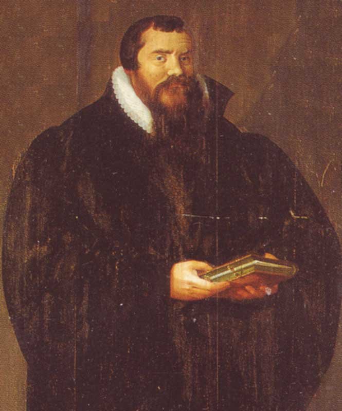 Gemälde Ägidius Hunnius der Ältere (1550-1603), deutscher lutherischer Theologe